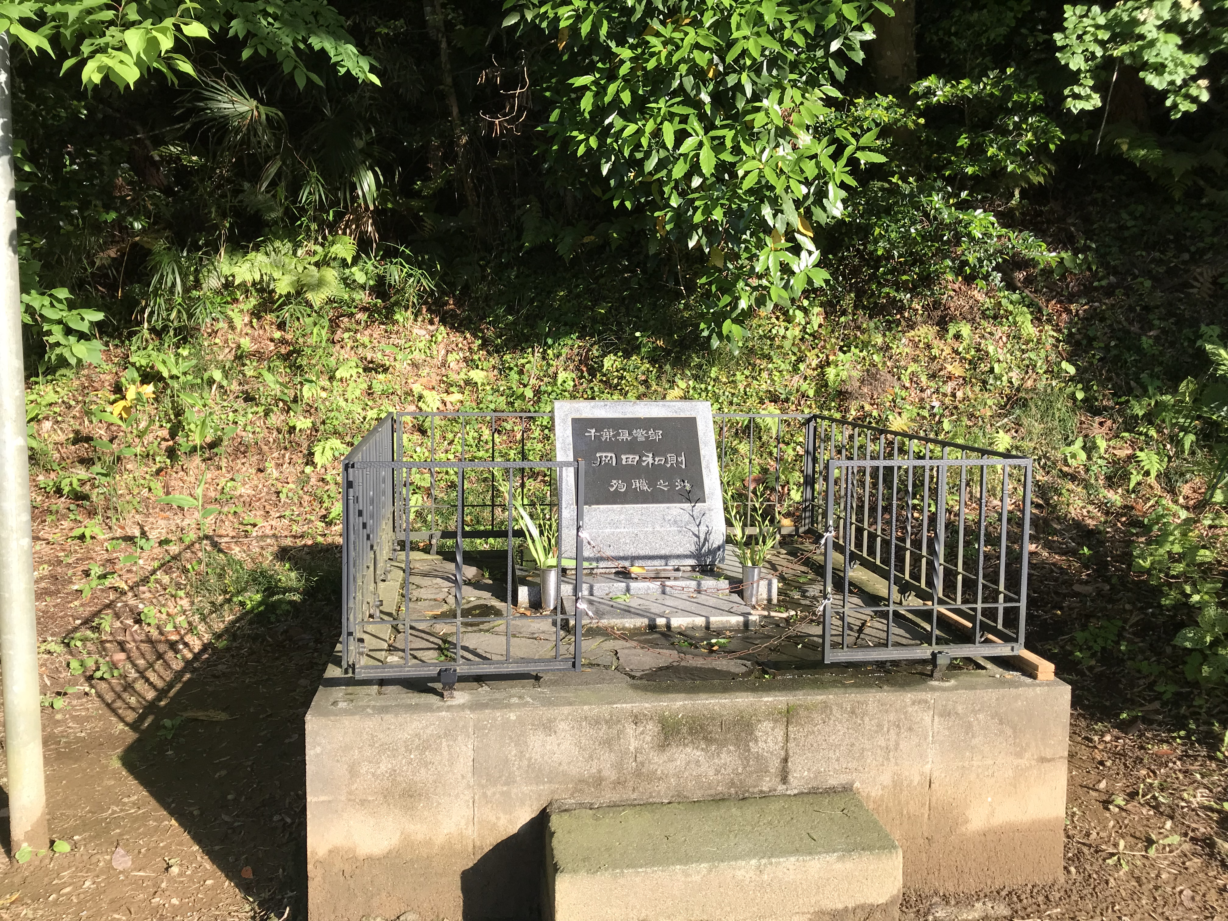 極左暴力集団による襲撃事件（1977年5月9日発生）の現場に建立された慰霊碑